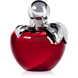 Nina Ricci pefume, 2007